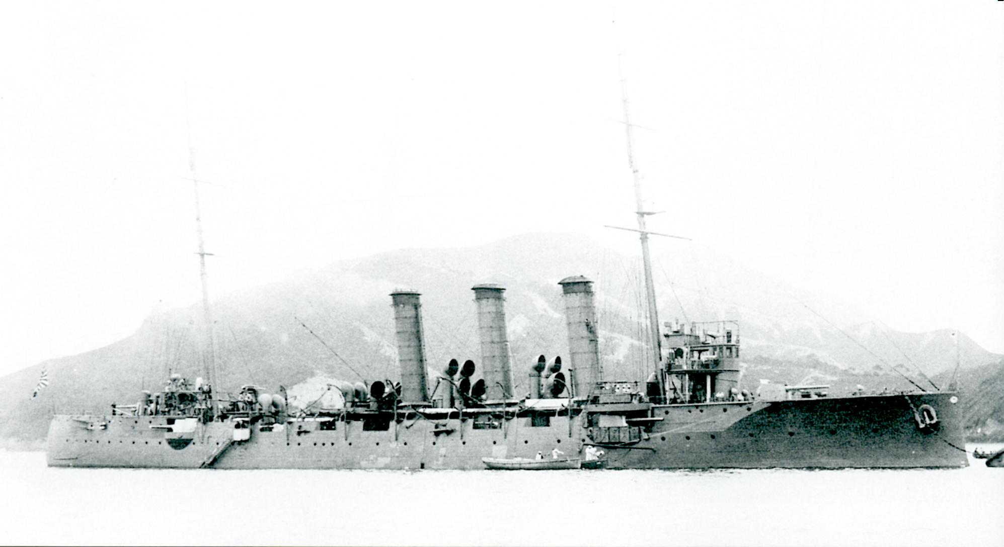 Japanese cruiser Niitaka in 1918, Sasebo